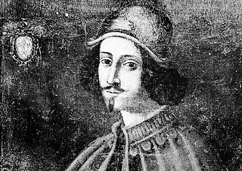 ritratto del pittore Orazio Alfani (+1583)